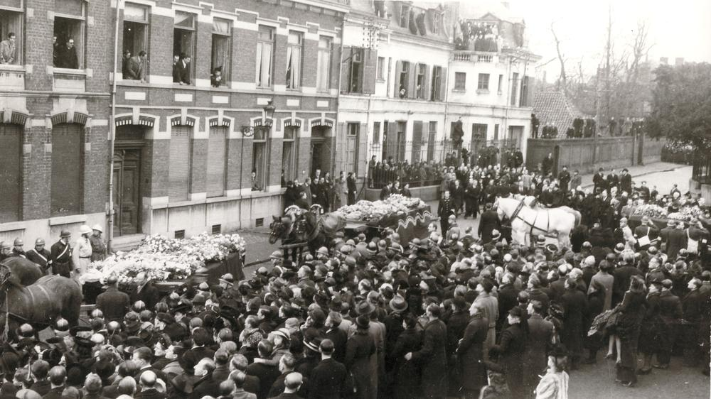 Funérailles des massacrés d'Ascq le 5 avril 1944.